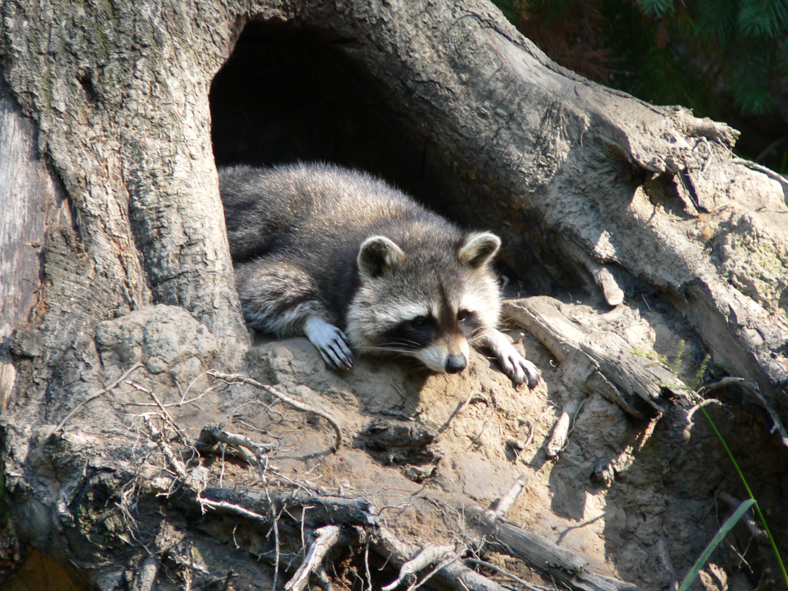 Procyon lotor